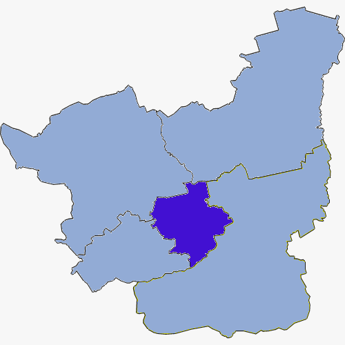 Powiat strzelecko-drezdenecki - Gmina Stare Kurowo